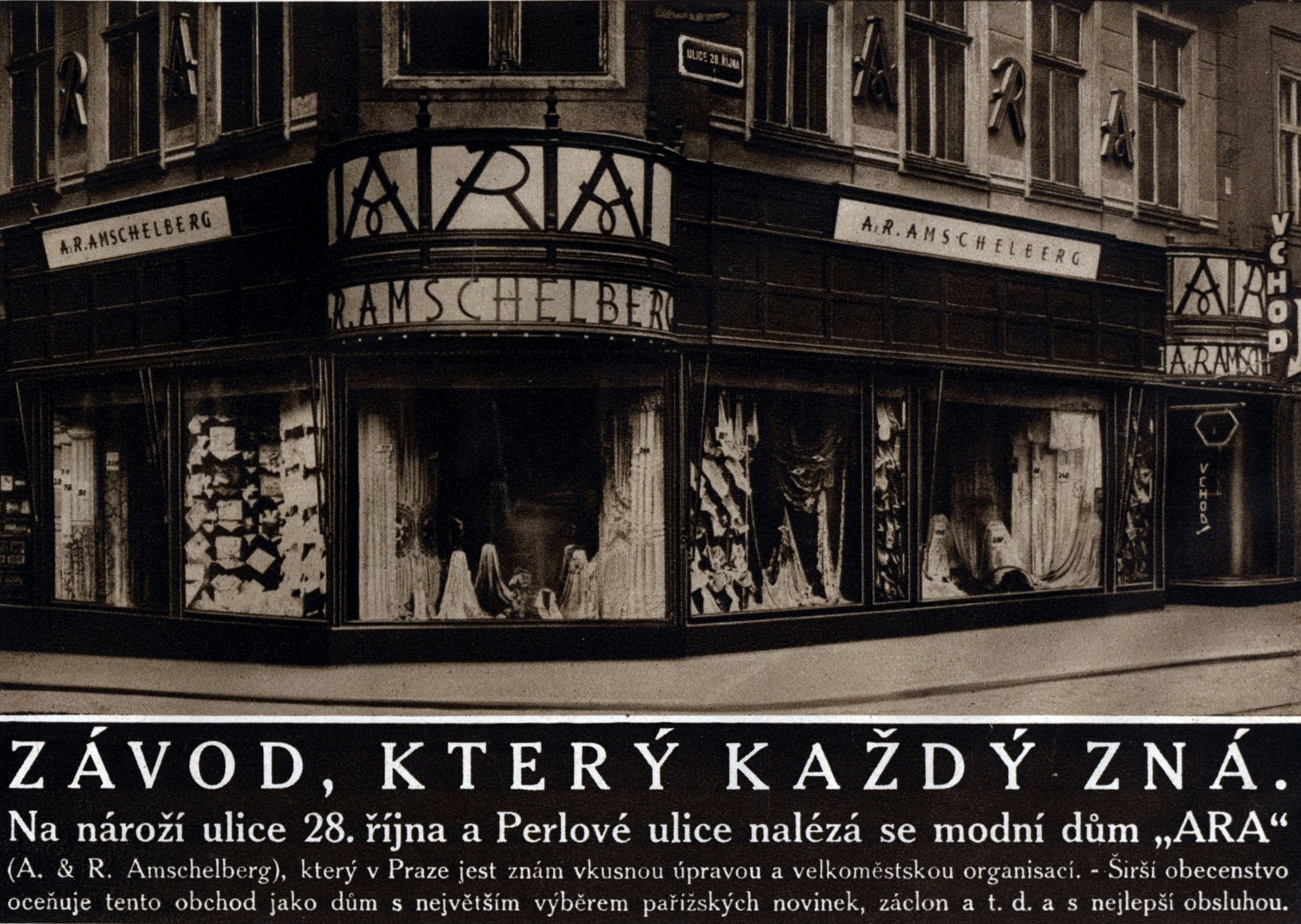 Palác ARA Praha, původní vzhled z r. 1926